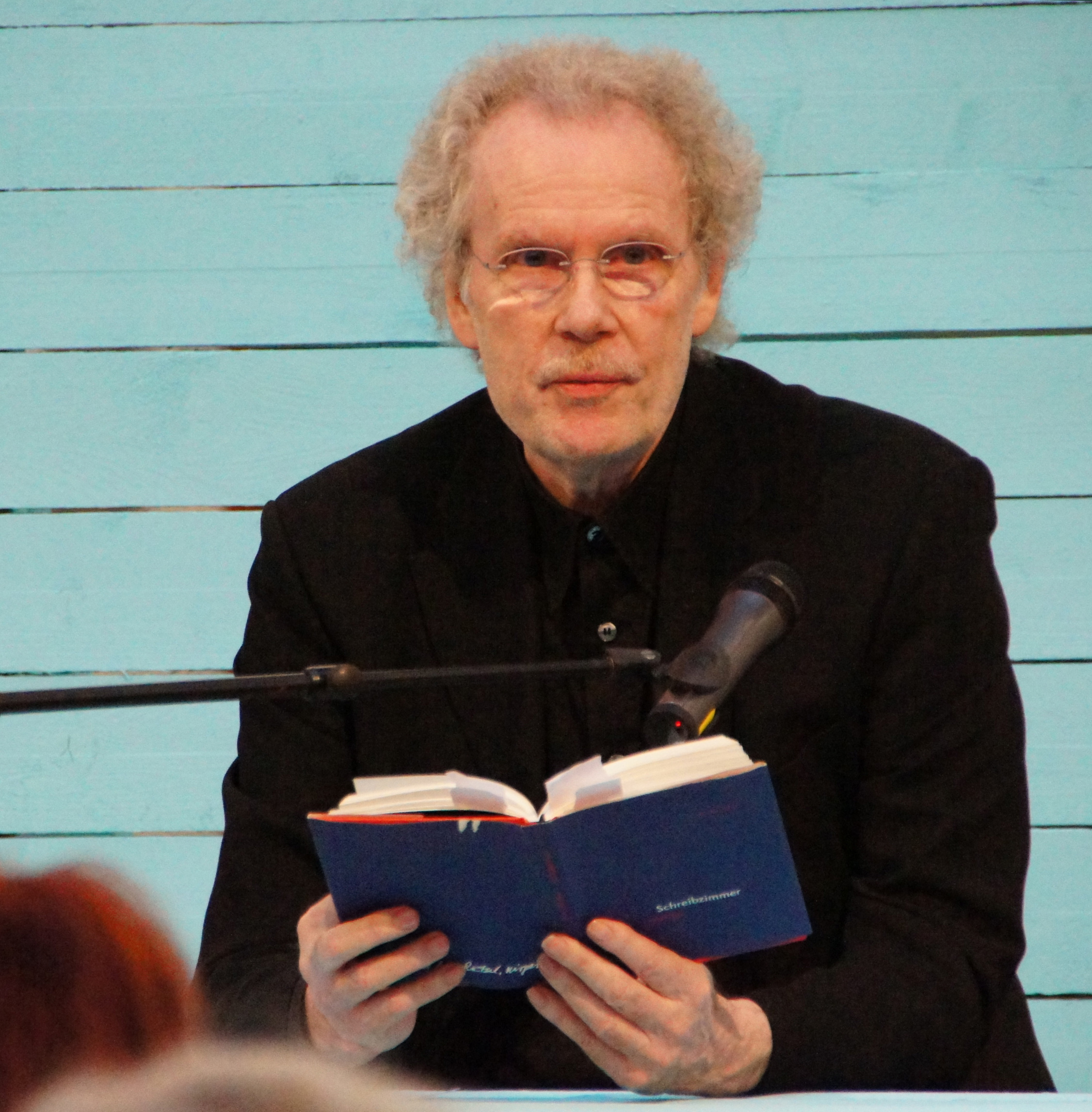 Unter dem Titel "Eine Versammlung kommt selten allein" lasen, anlässlich des 40. Jahrestages der Gründung, Lyriker und Lyrikerinnen der Grazer Autorinnen Autorenversammlung im "Salon für Kunstbuch im 21er Haus". Abgebildete Personen: S. Dateiname.